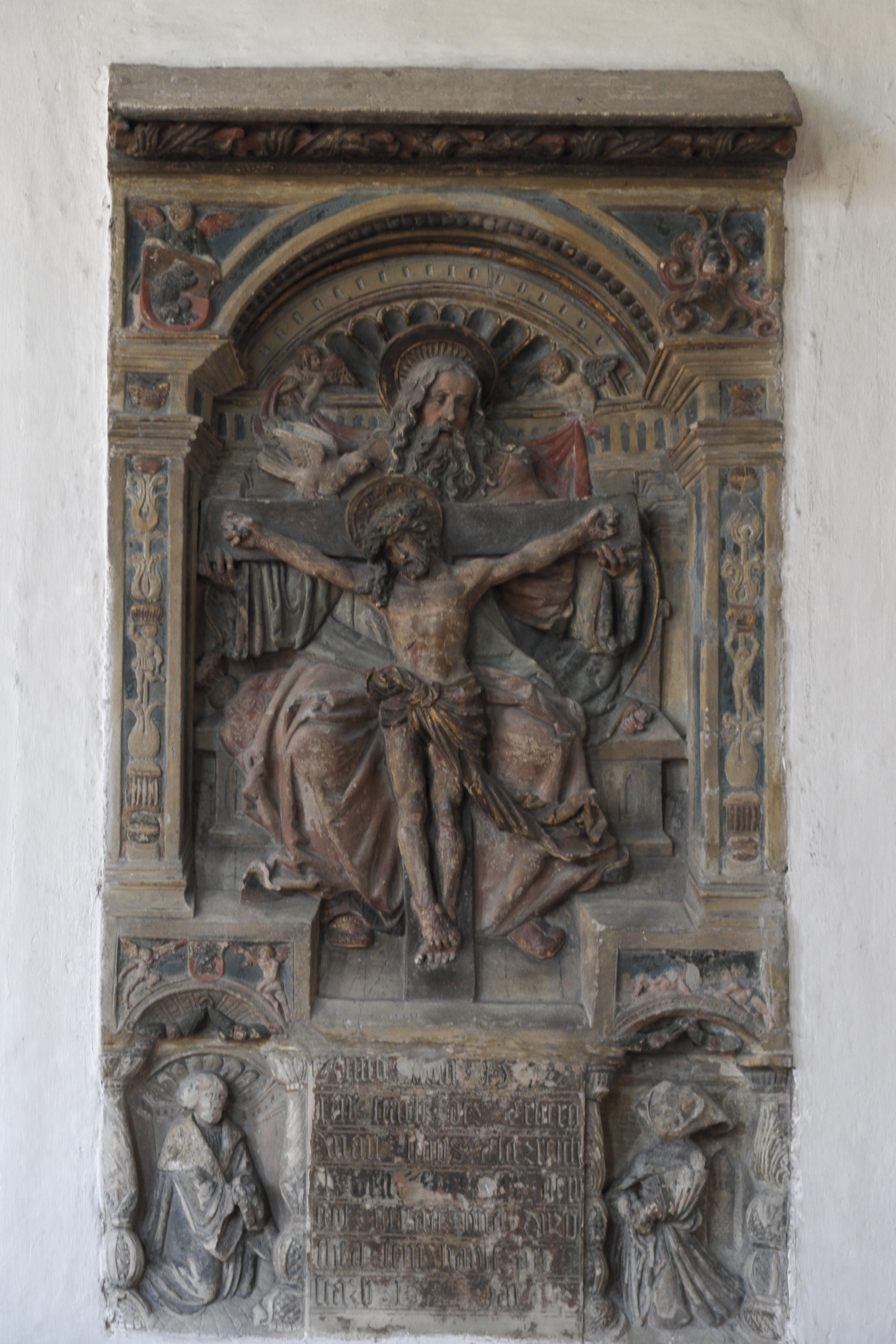 Franziskanerkirche in Ingolstadt (Bayern/Deutschland), Epitaph für Hans und Dorothea Esterreicher, von 1522, von Stephan Rottaler; Darstellung: Gnadenstuhl